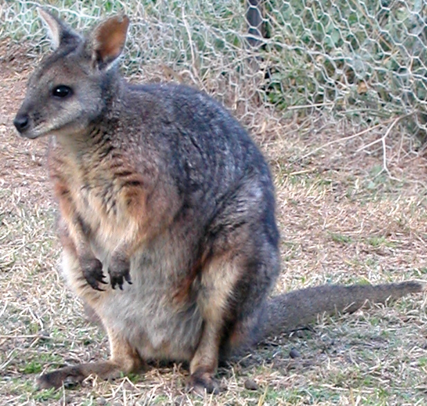 Macropus eugenii (Kangaroo species)